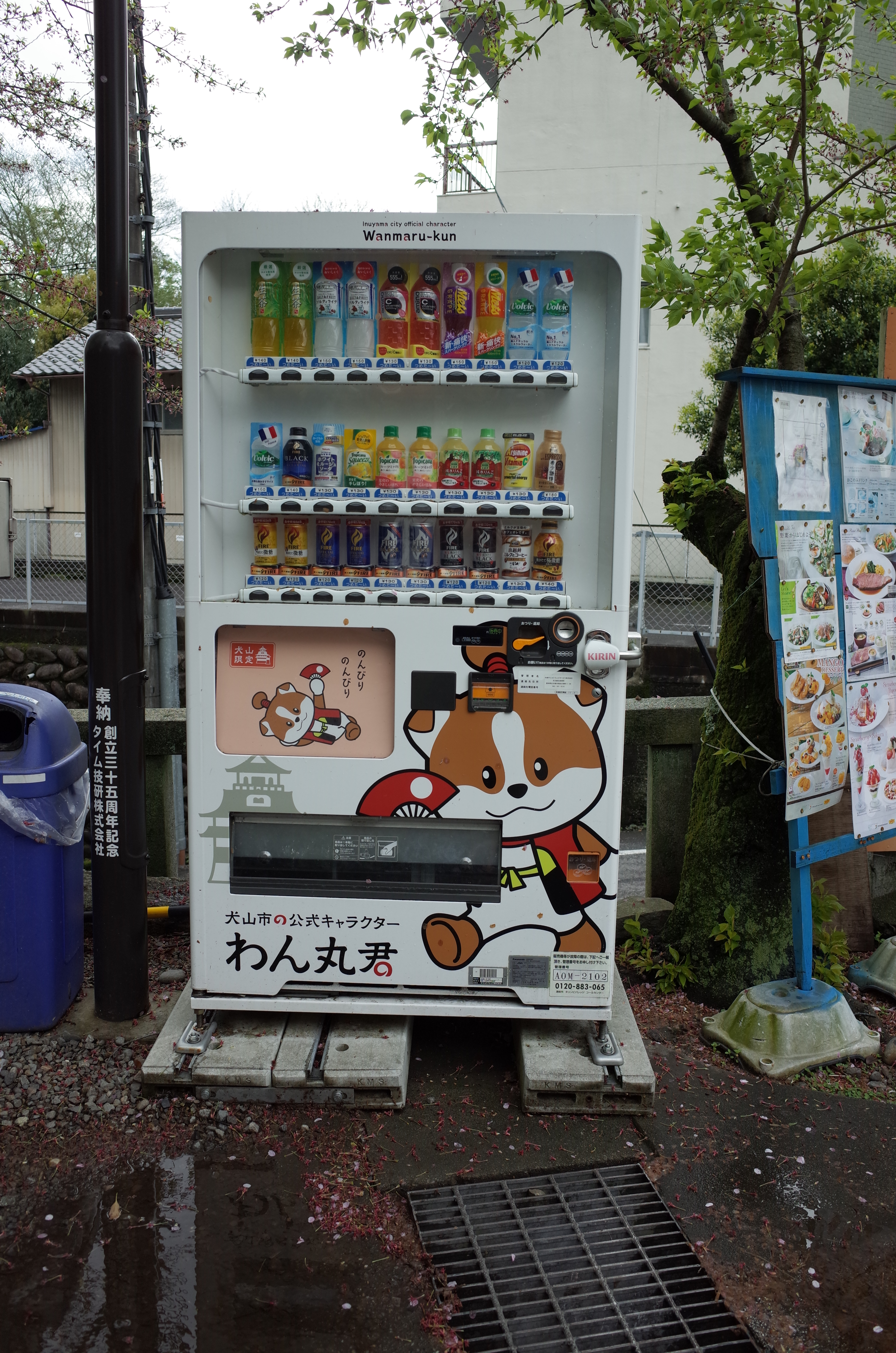 犬山城下町